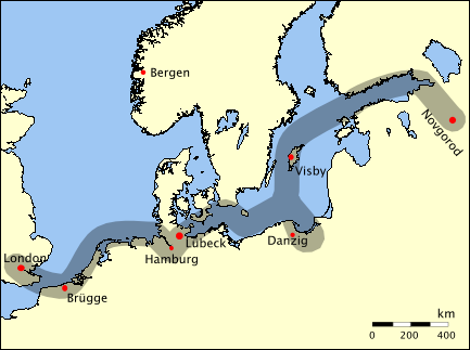 Haupt Route des mittelalterlichen Hanse Verkehrs